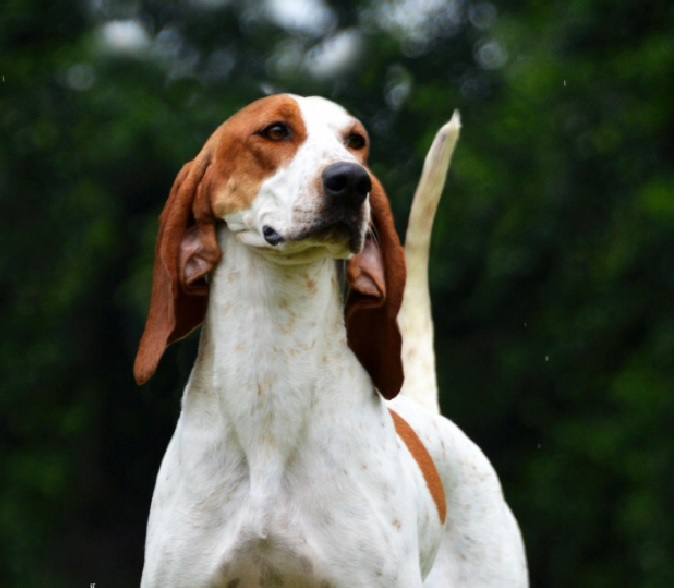 ejemplar de la raza